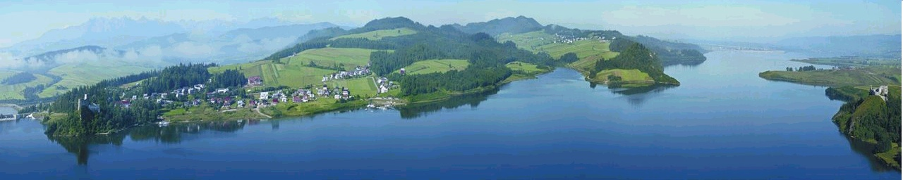 two castles Niedzica and Czorsztyn, Poland, Czorsztynkie Lake